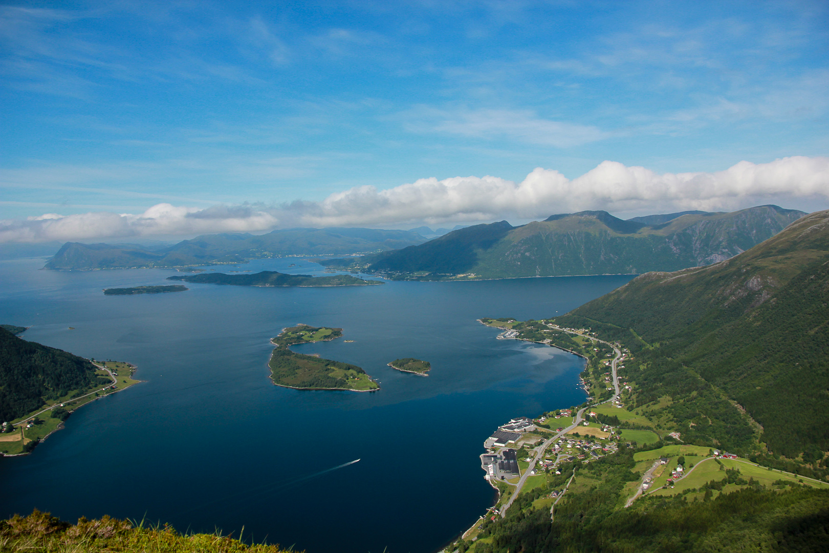 Utsikt til Raudøya sett fra Liadalsnipa i Ørsta